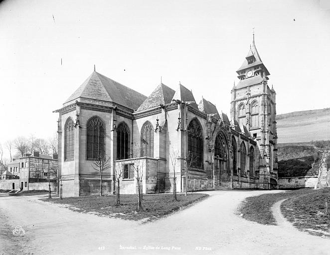 Eglise Saint-Ouen de Longpaon, ensemble Nord-Est, photographie en négatif par Neurdein Frères (photographes).